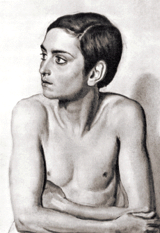 "Обнаженный мальчик"